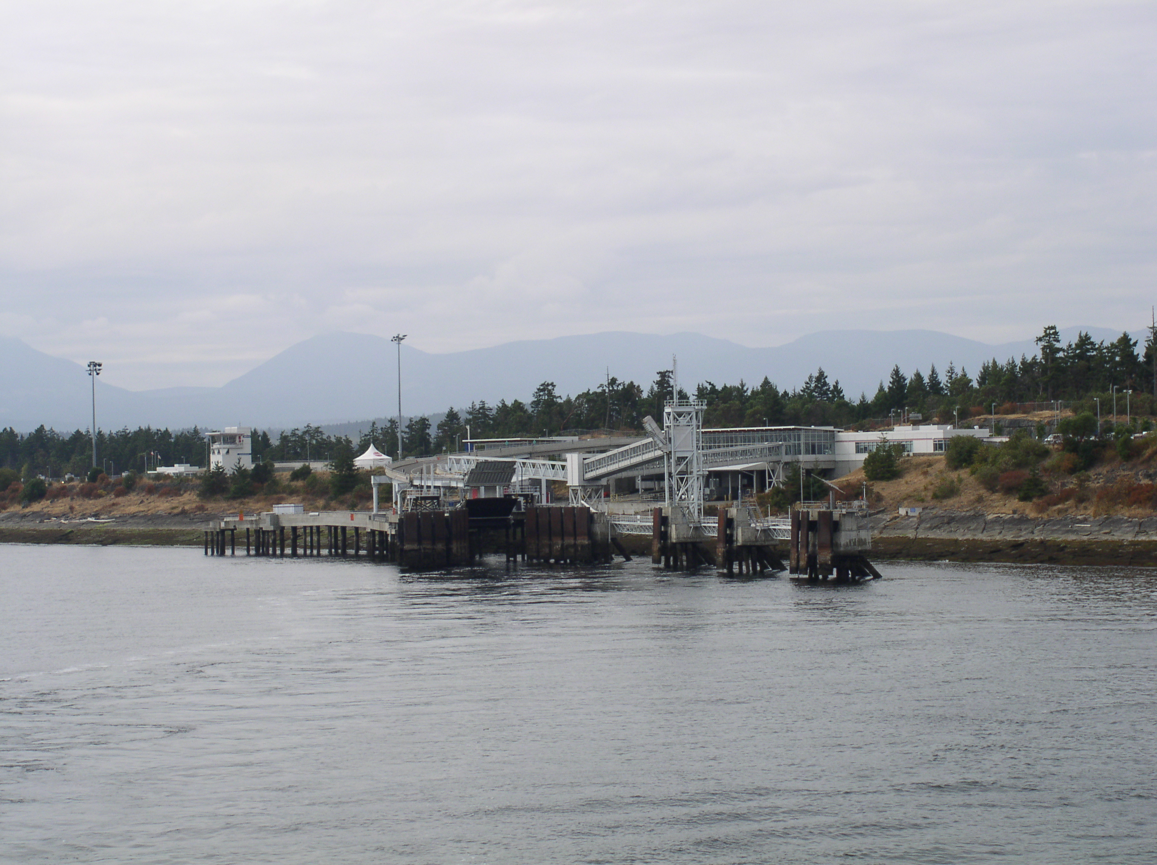 BC Ferries Duke Point Terminal